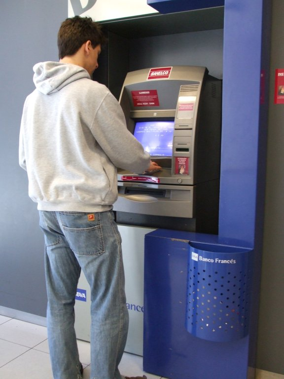 Usuario utilizando cajero automático "Banelco"